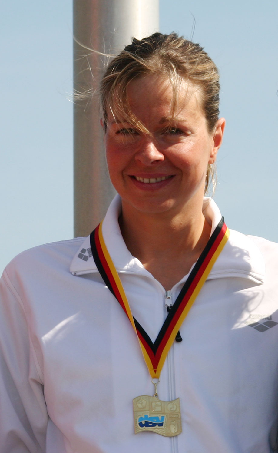 Angela Maurer, Siegerin bei der Deutschen Meisterschaft im Freiwasser-Schwimmen in Lindau im Bodensee über 10km Angela Maurer, German national champion at 10km open-water swimming championships held in Lake Constance at Lindau copied from Datei:IMG 8073 maurer cut.jpg